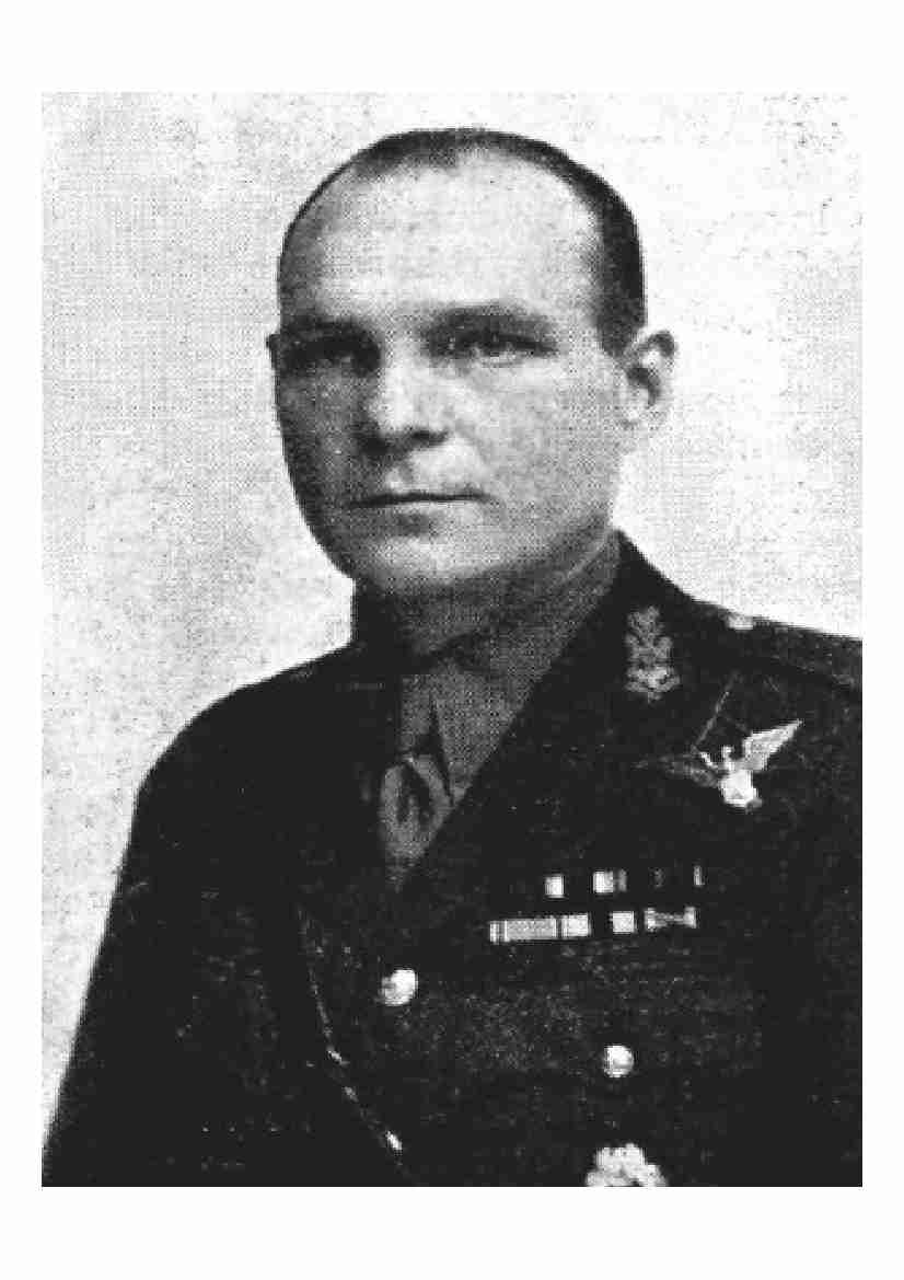 Karl Soo. Foto on pärit Nõukogude Liidu poolt likvideeritud Kaitseliidu arhiivist. Fotol olev isik on mõrvatud 1941.a.